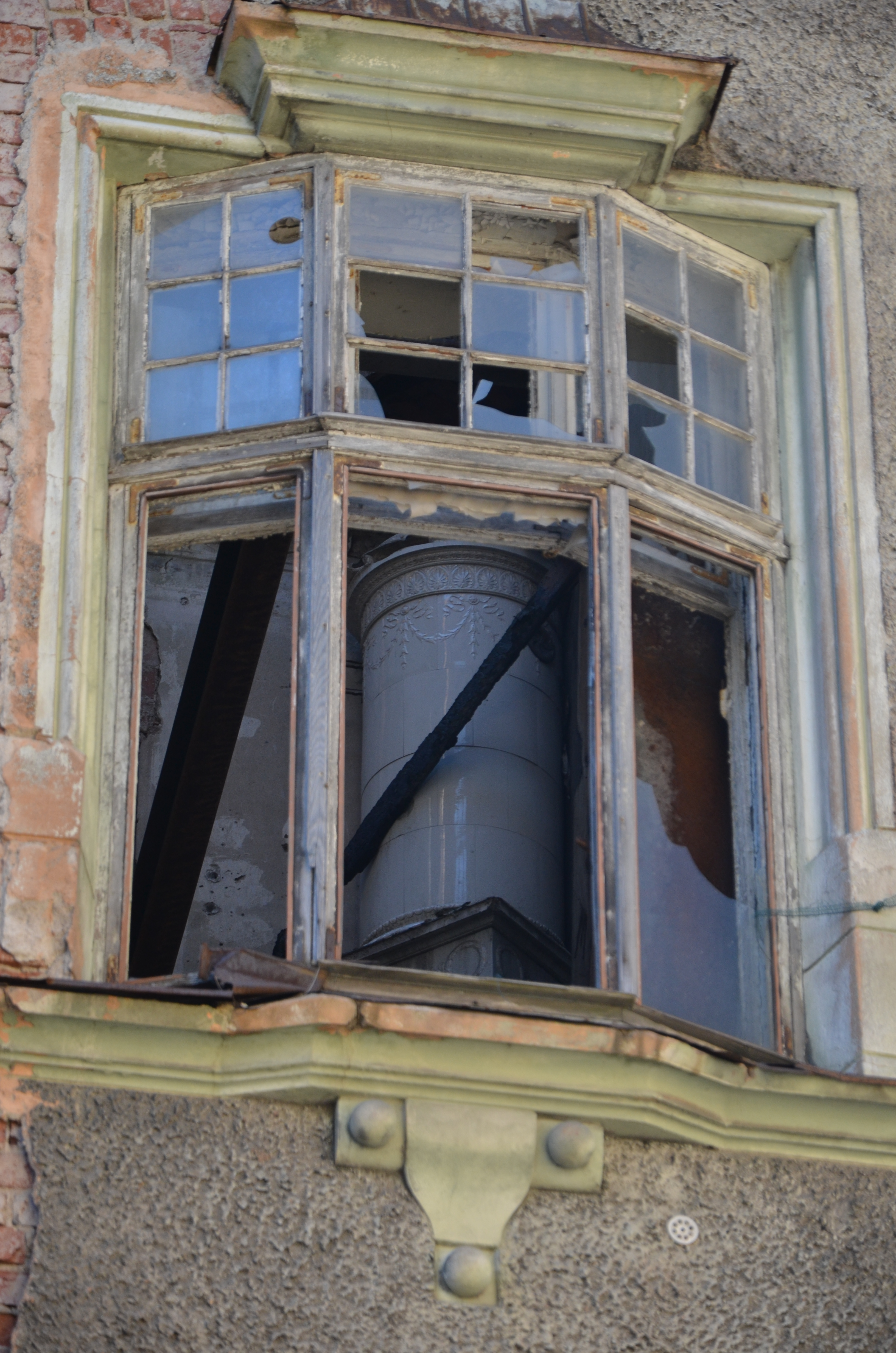 Жилой дом (Санкт-Петербург и Лен.область, Выборг, улица Крепостная, 11)